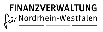 Neues Logo